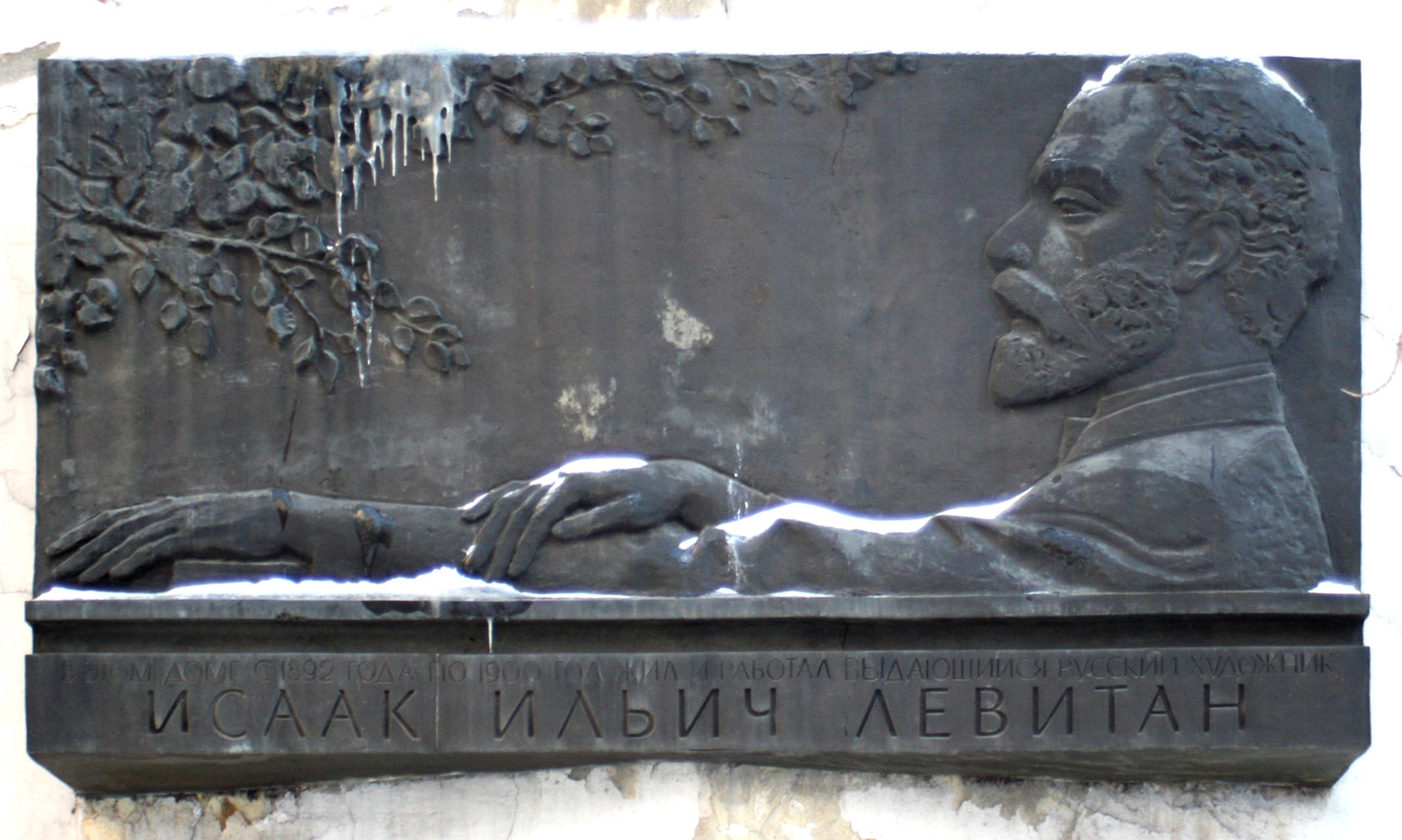 Мемориальная доска на доме-мастерской Исаака Ильича Левитана, где было создано много знаменитых полотен художника - "Вечер. Золотой Плес", "После дождя. Плес". Валентин Серов написал здесь портрет художника.